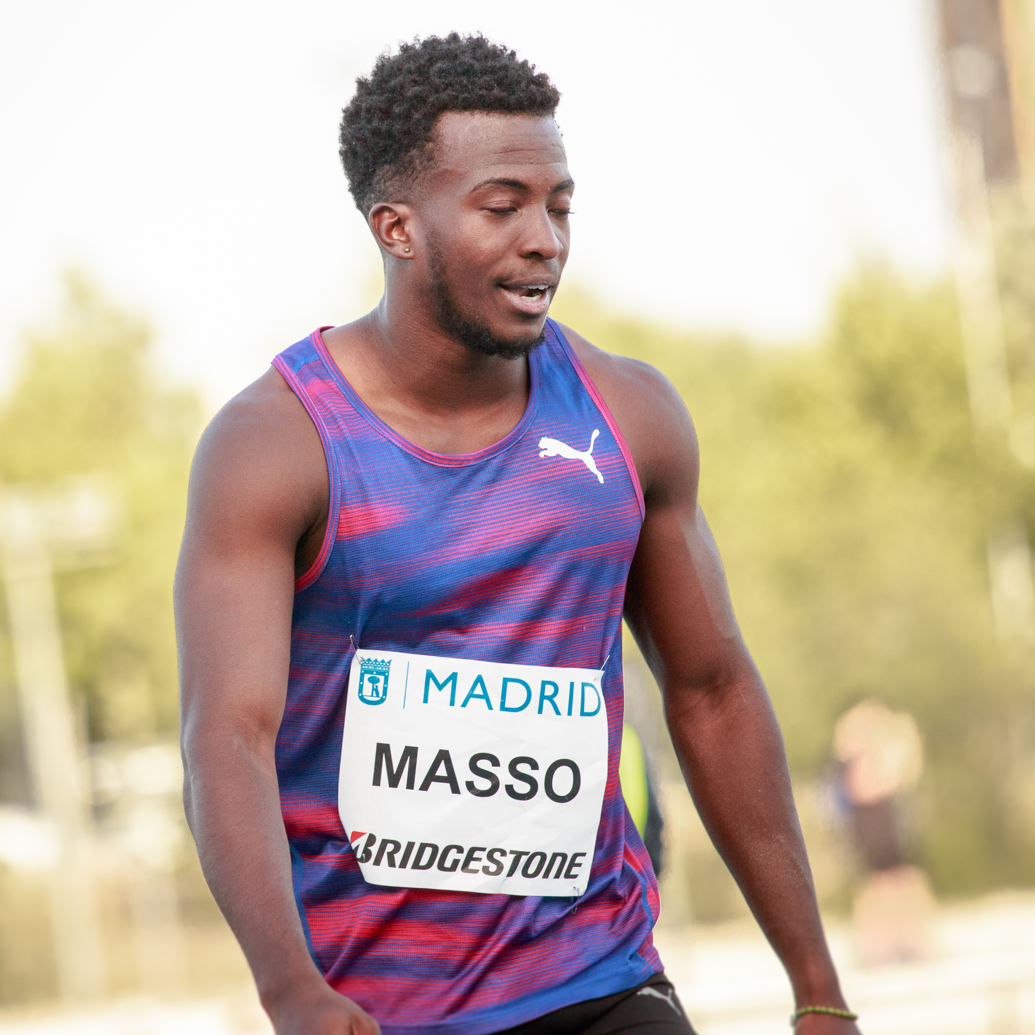 Maykel Demetrio Masso (CUB). Salto en largo. IAAF World Challenge. Meeting Madrid 2017. Moratalaz, Madrid.